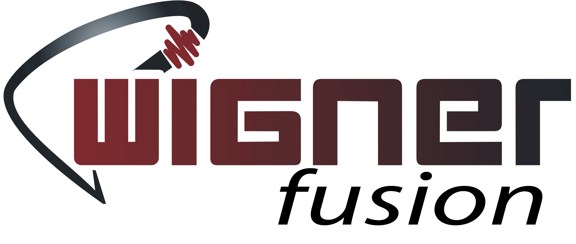 Wigner fusion kutatócsoportok logoja